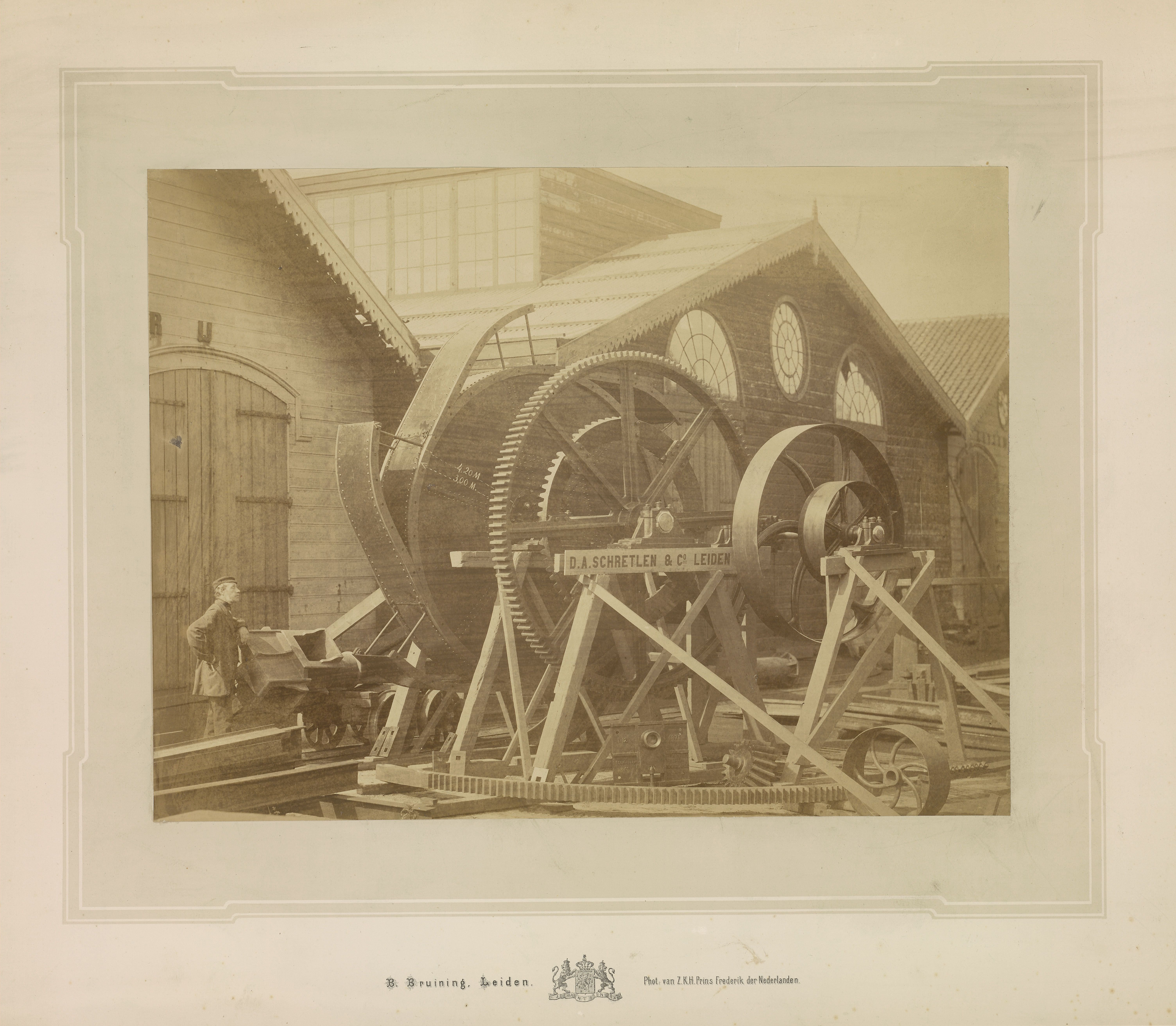 Fabriek van werktuigen en ijzergieterij van D.A. Schretlen & Co. Loodsen en ijzerwerk.